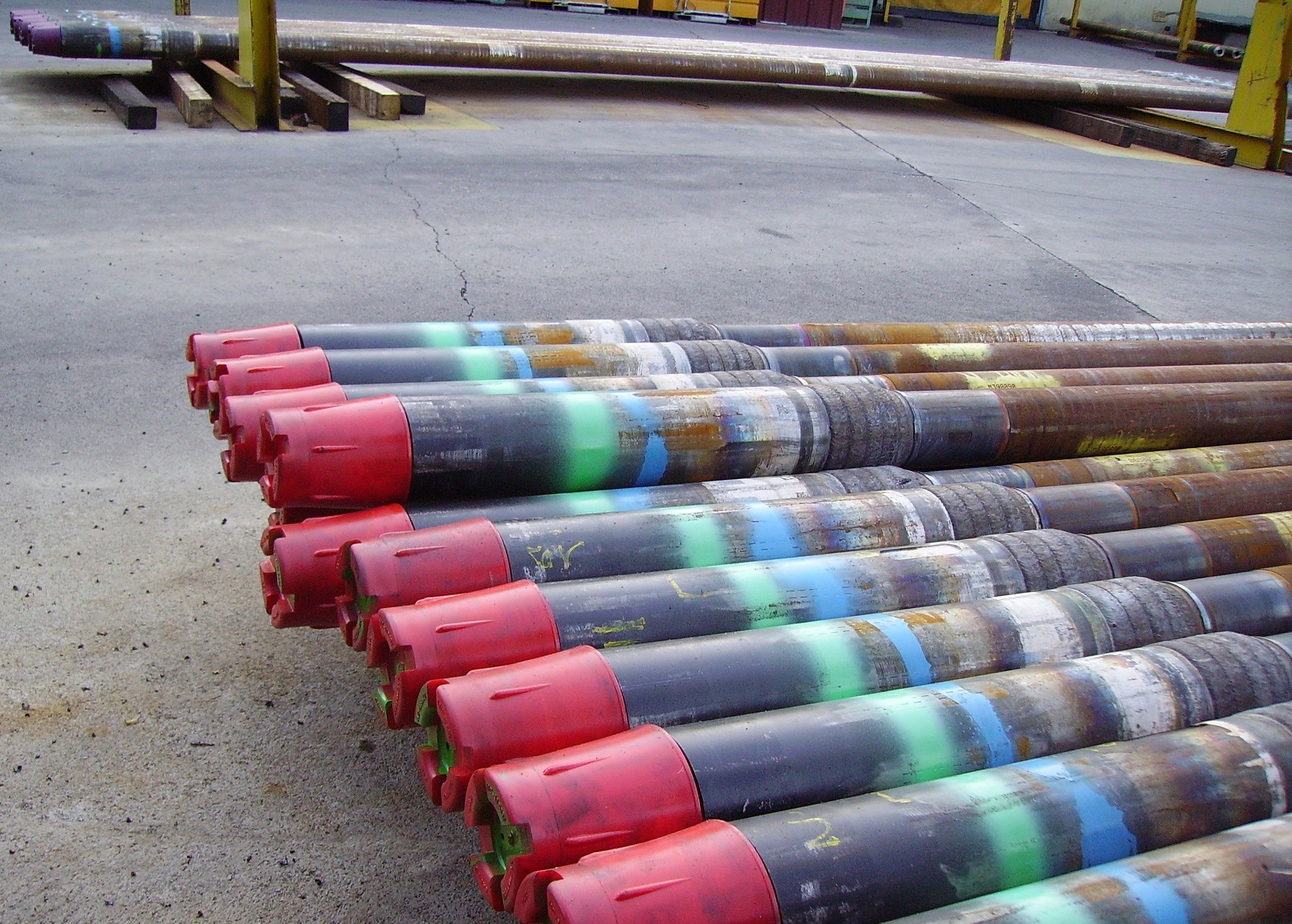 Tiges de forage après fabrication. Société VAM Drilling France, usine de Villechaud (près de Cosne-Cours-sur-Loire), Nièvre.